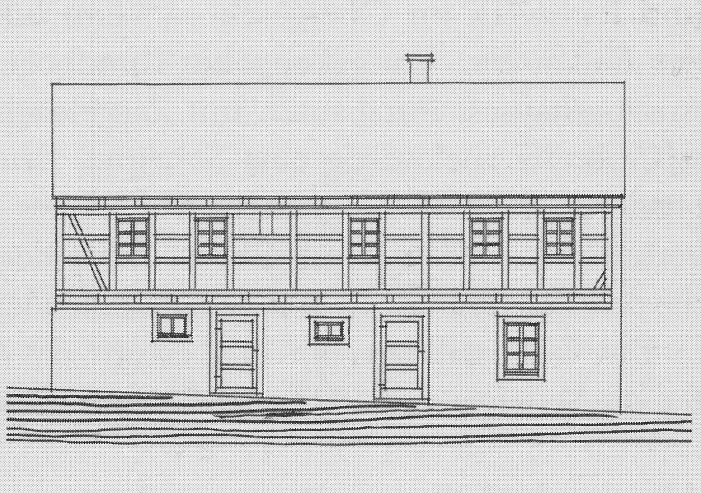 Radebeul Dreiseithof Altnaundorf 35 Bauzeichnung Nebengebäude 1902